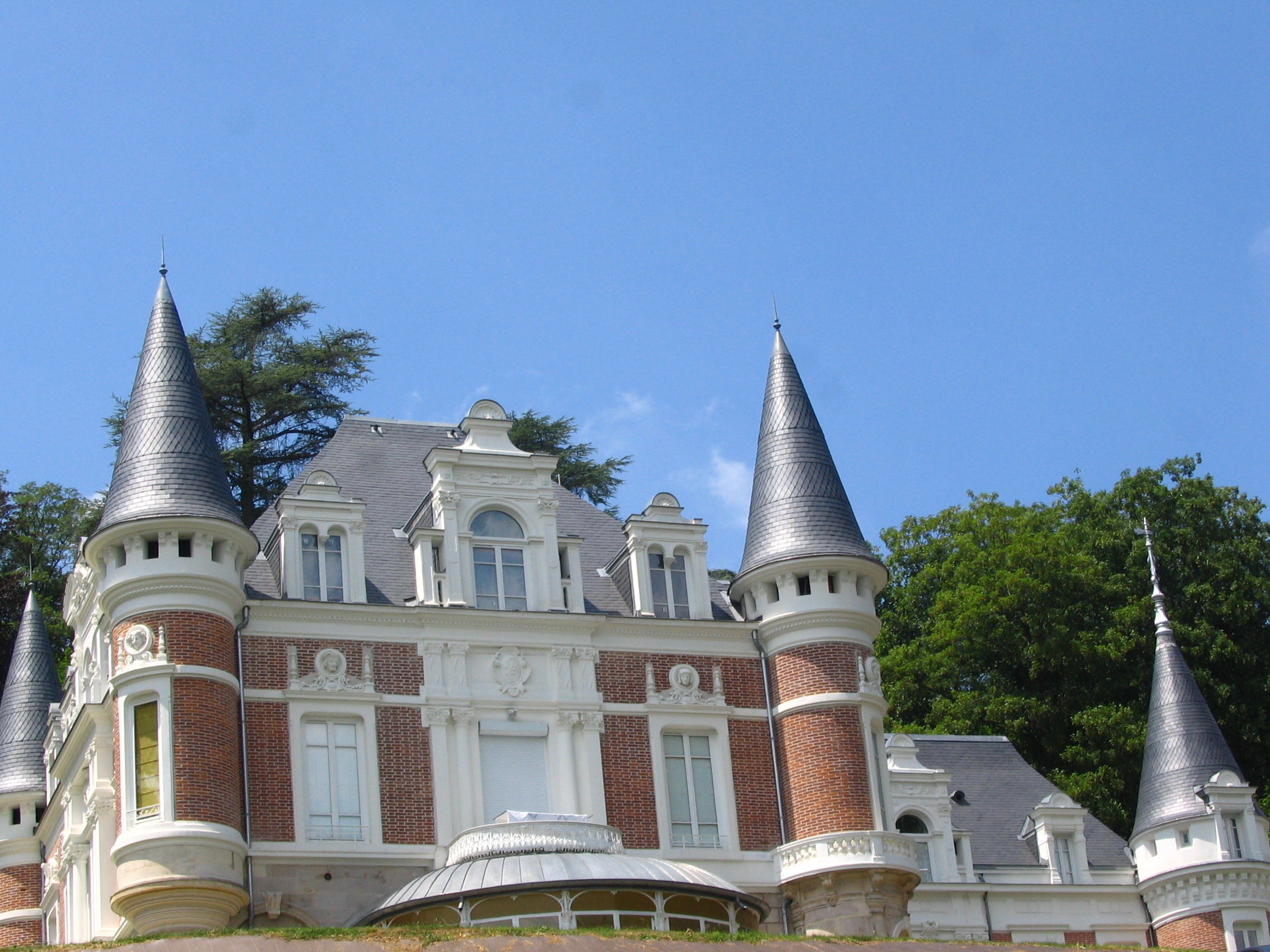 Le château de Valjoly dans le parc Fraisse, Sorbiers (Loire).